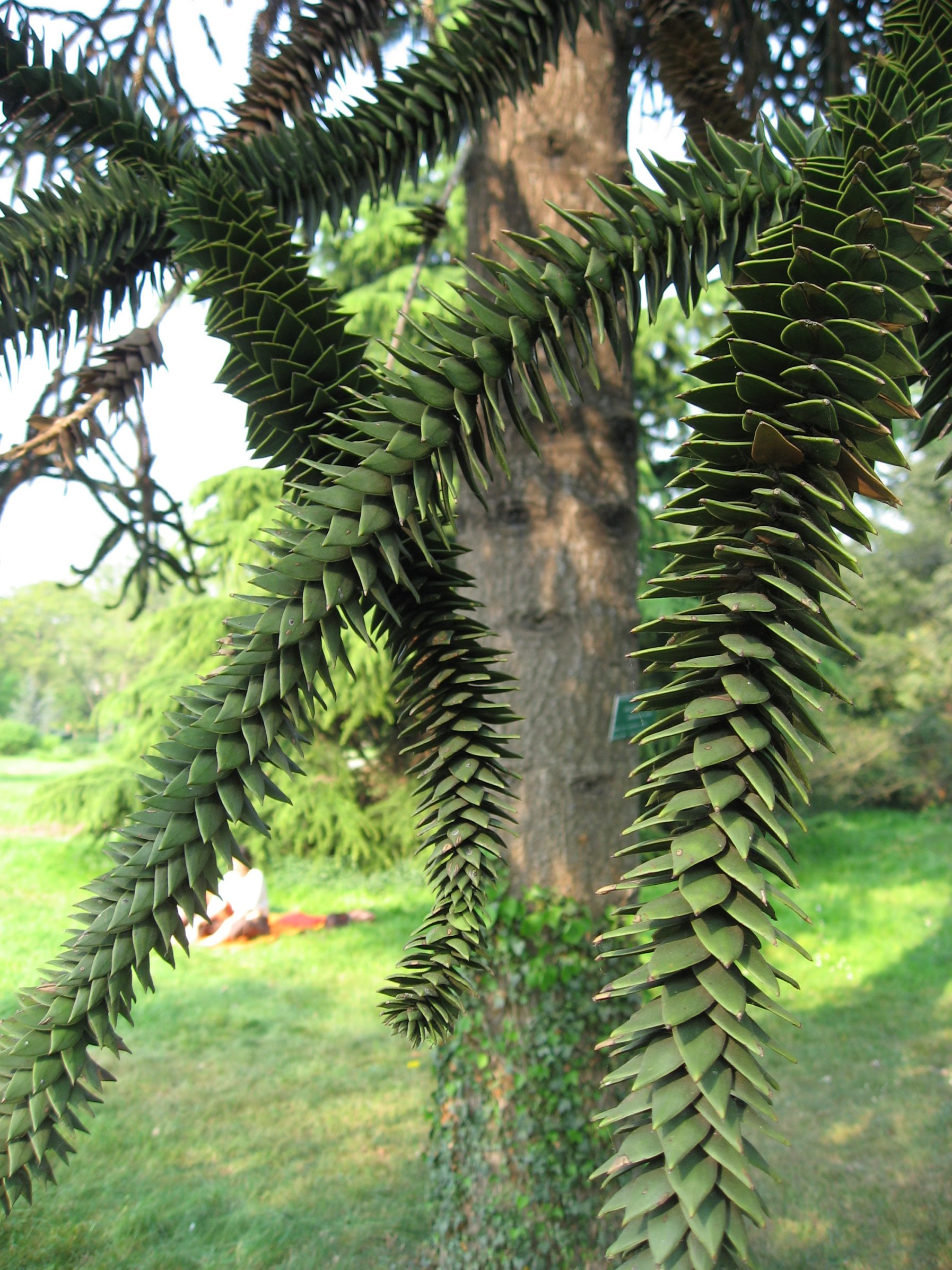 Araucaria araucana (Désespoir des singes)(10m high)(planted in 1907) in Parc de Bagatelle Map: 48° 52' 17" N 2° 14' 50" E